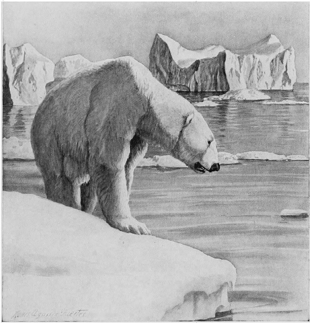 Ursus maritimus